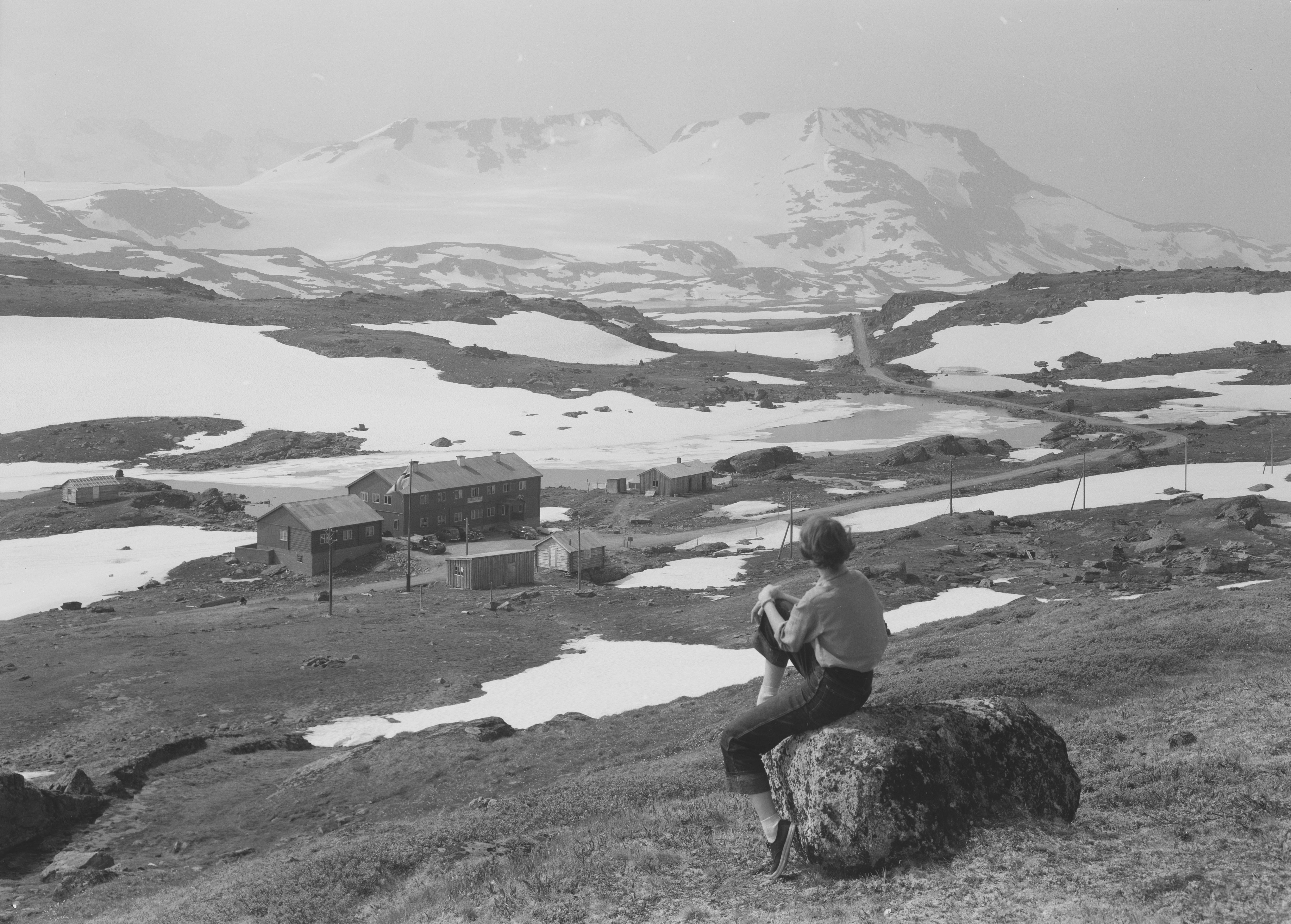 Bildet er hentet fra Nasjonalbibliotekets bildesamling Sognefjellet,Sognefjellshytta, Lom, Oppland